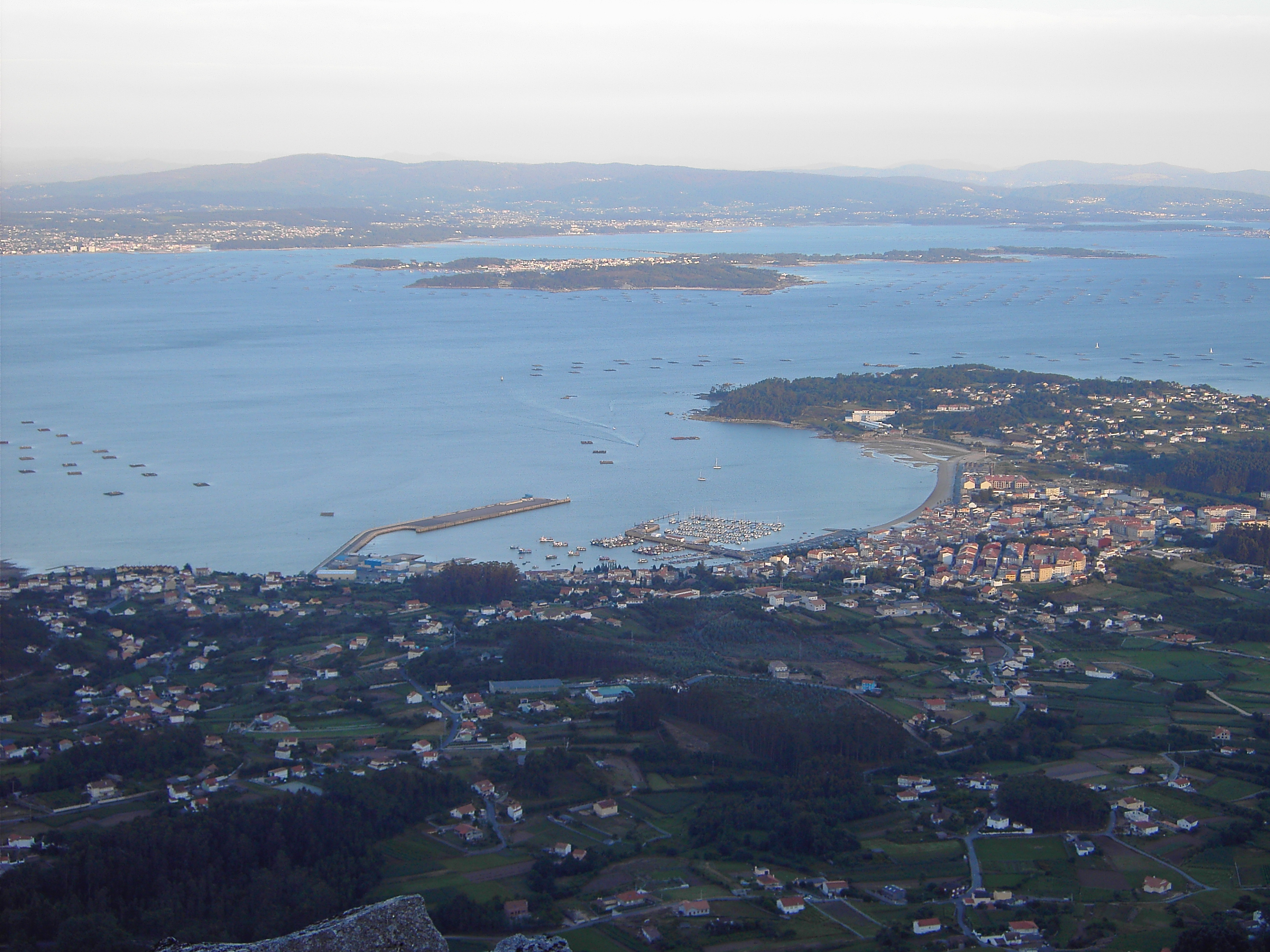 Vista desde la Curota.